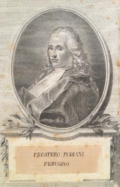 Prospero Podiani, il primo direttore della Biblioteca Augusta (1582-1615), incisione appartenente alla 'Collezione Macellari', di proprietà della Regione Umbra, conservata in deposito a Palazzo della Penna. L’incisore, come si legge, è Lorenzi.